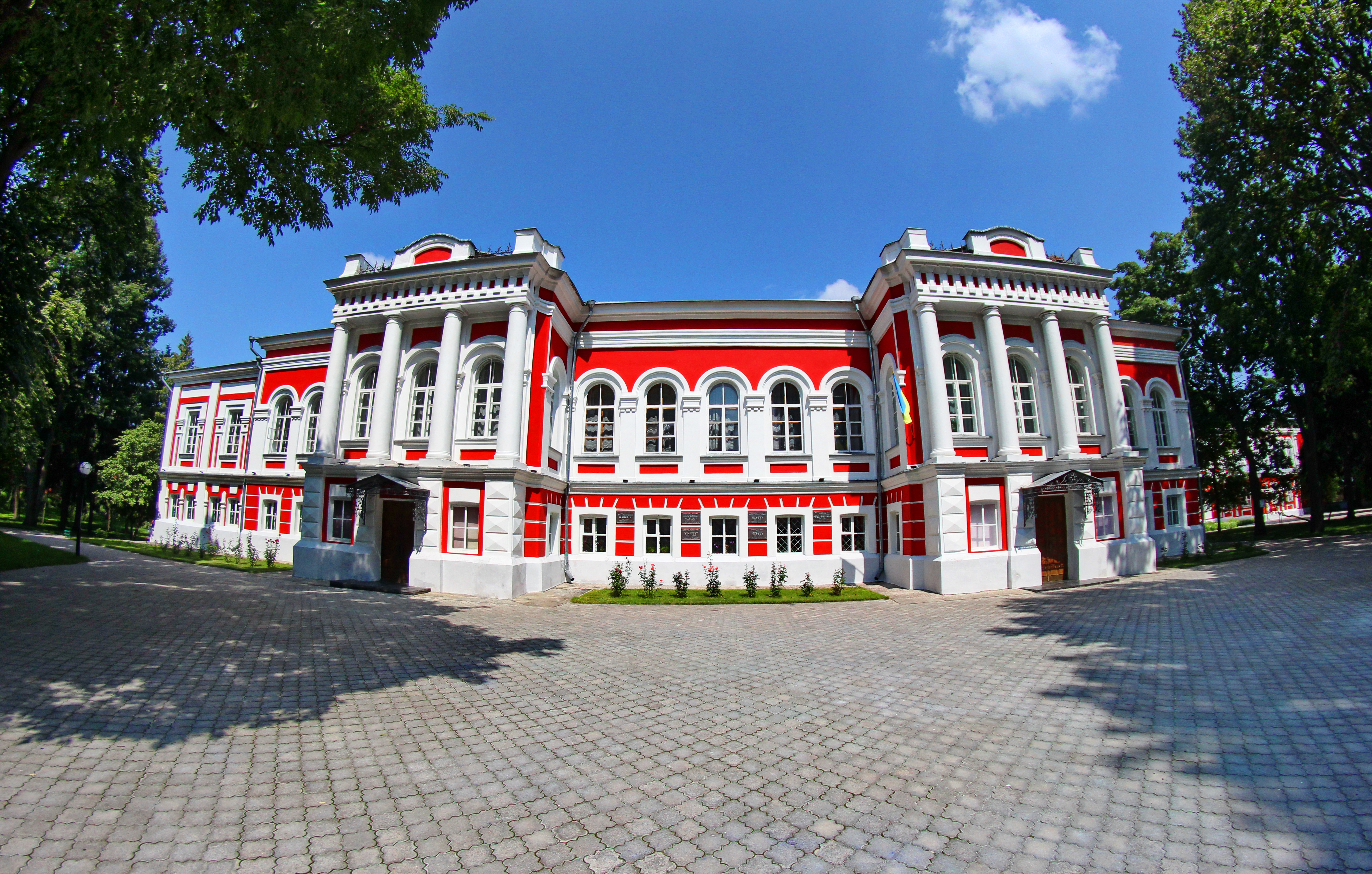 Глухівська чоловіча гімназія, Глухів, вул. Києво-Московська, 24